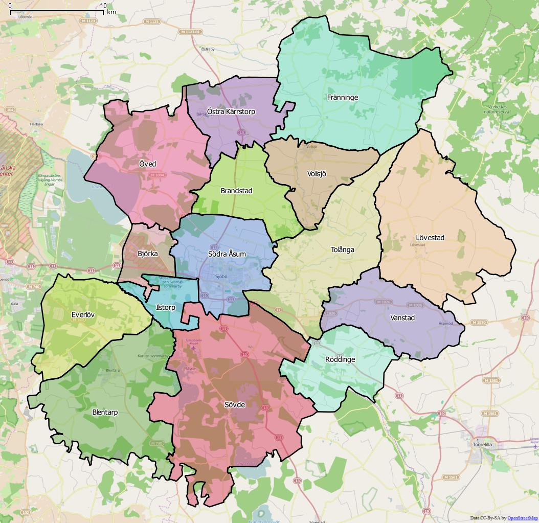 Distriktsindelningen i kommunen. World file: 54.71928628067051648 0 0 -54.71928628067051648 1501784.38022261601872742 7515644.58766410686075687